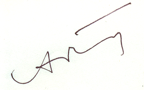 Signature d'André Martinet (1908-1999) en 1977.